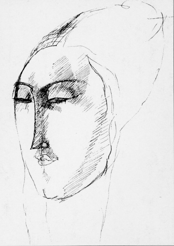 dessin de Modigliani